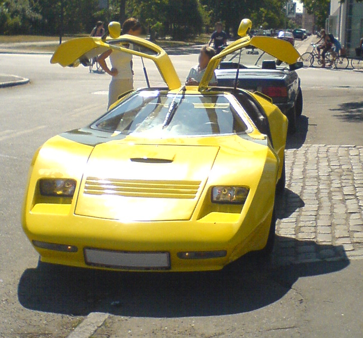 Eagle SS kit car, at used car dealer in Copenhagen (København), Denmark